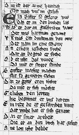 Überarbeitung des Manuscript Heidelberg, UB, Cpg 341, fol. 249ra (Prologue)